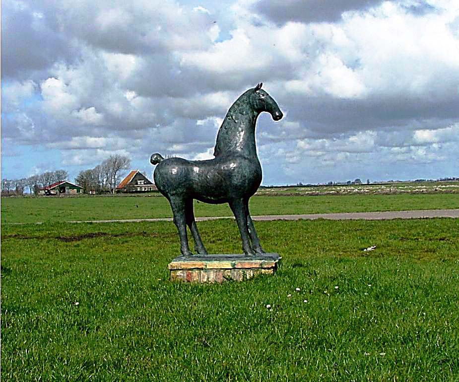 Evert van Hemert,2000-2005